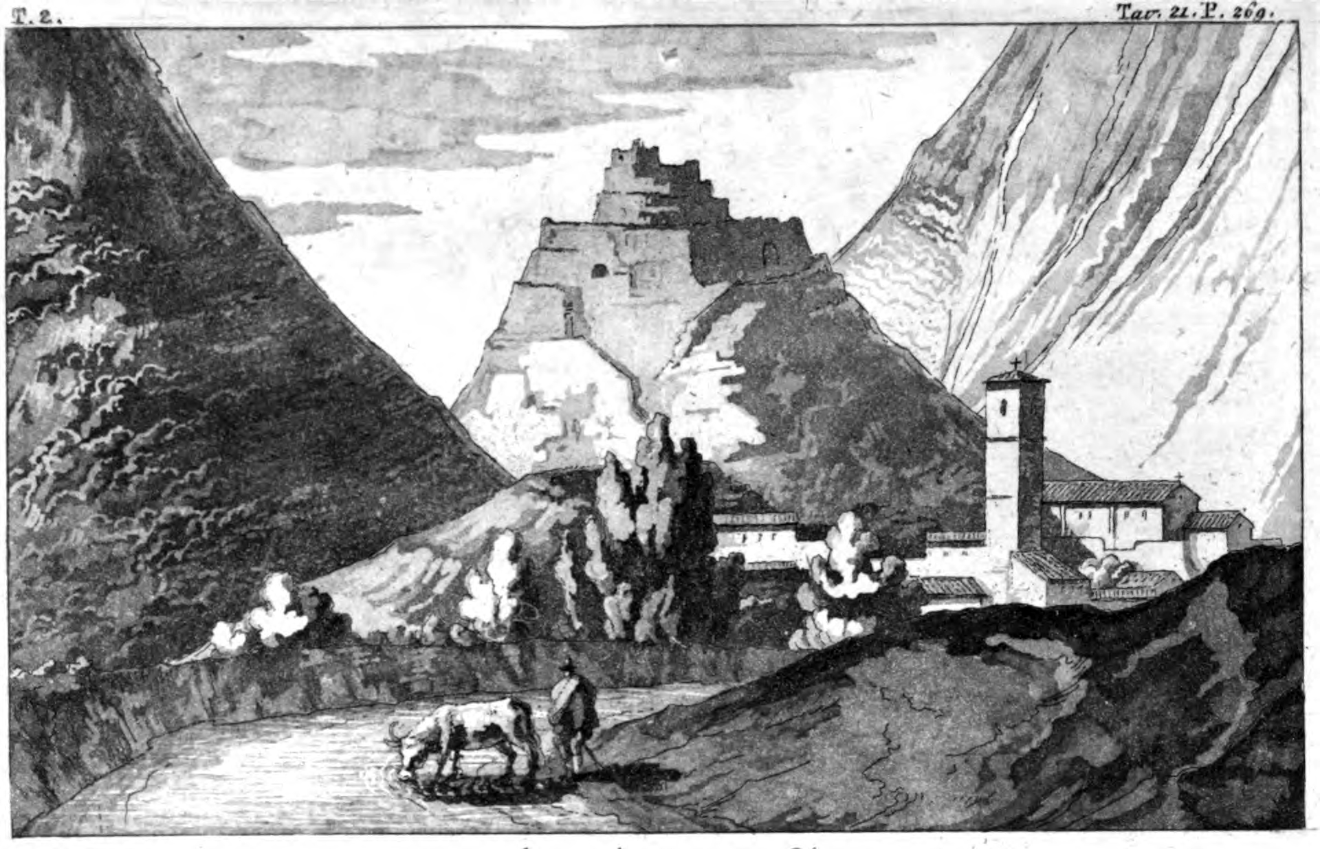 Antrodoco con il fiume Velino